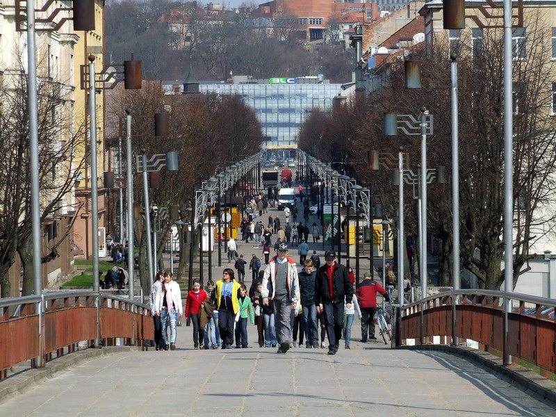 S. Daukanto gatvė, Kaunas.